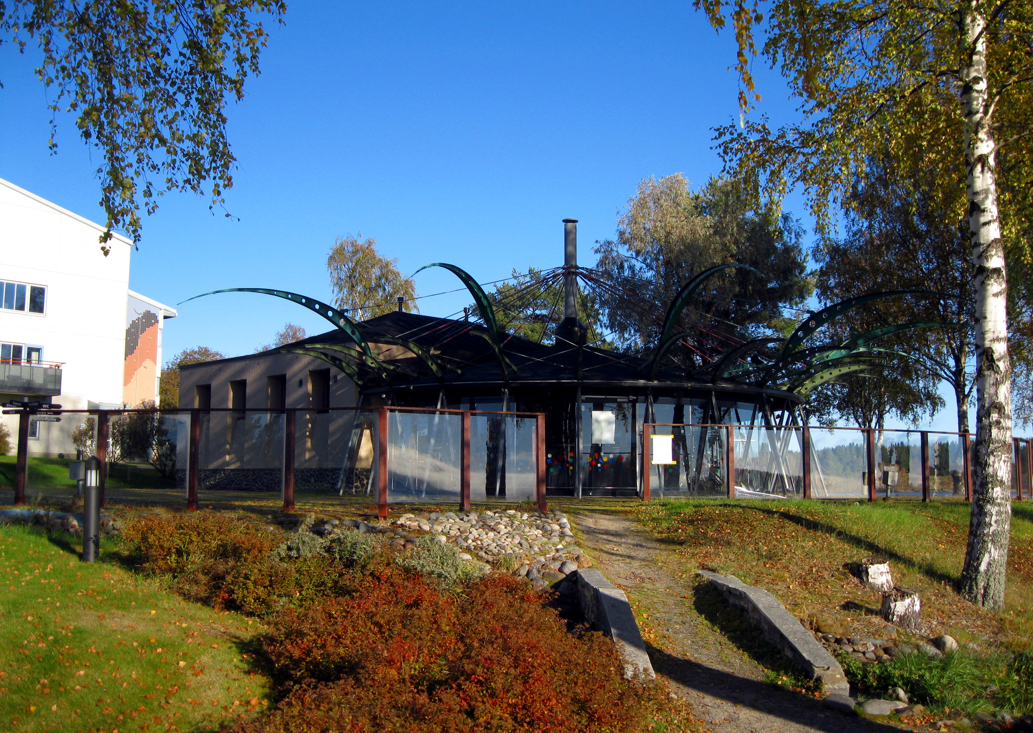 Cafe bar Rantakirppu lokakuussa 2015.